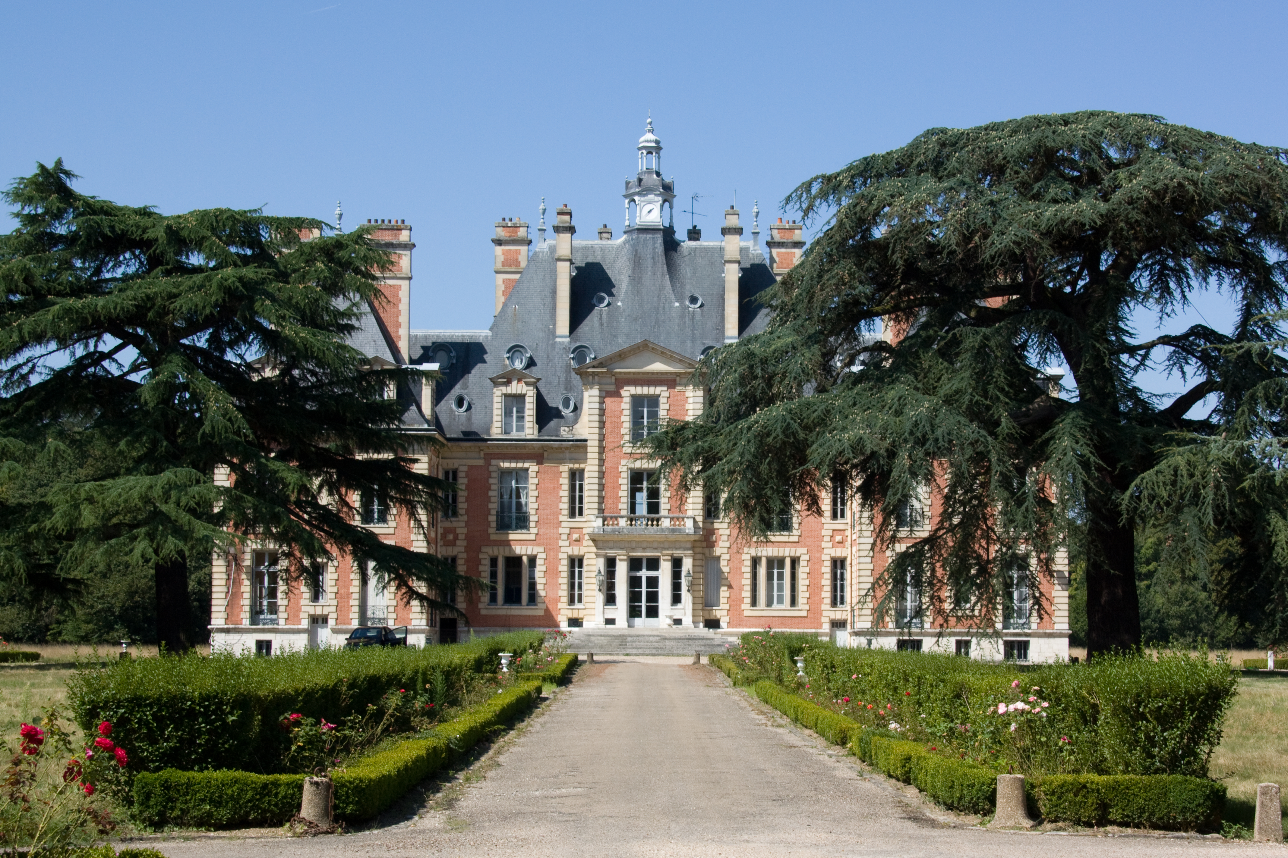 Château de Nainville-les-Roches. Nainville-les-Roches, Essonne. France.